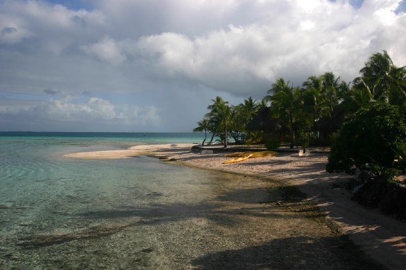 Tikehau, archipel des Tuamotus